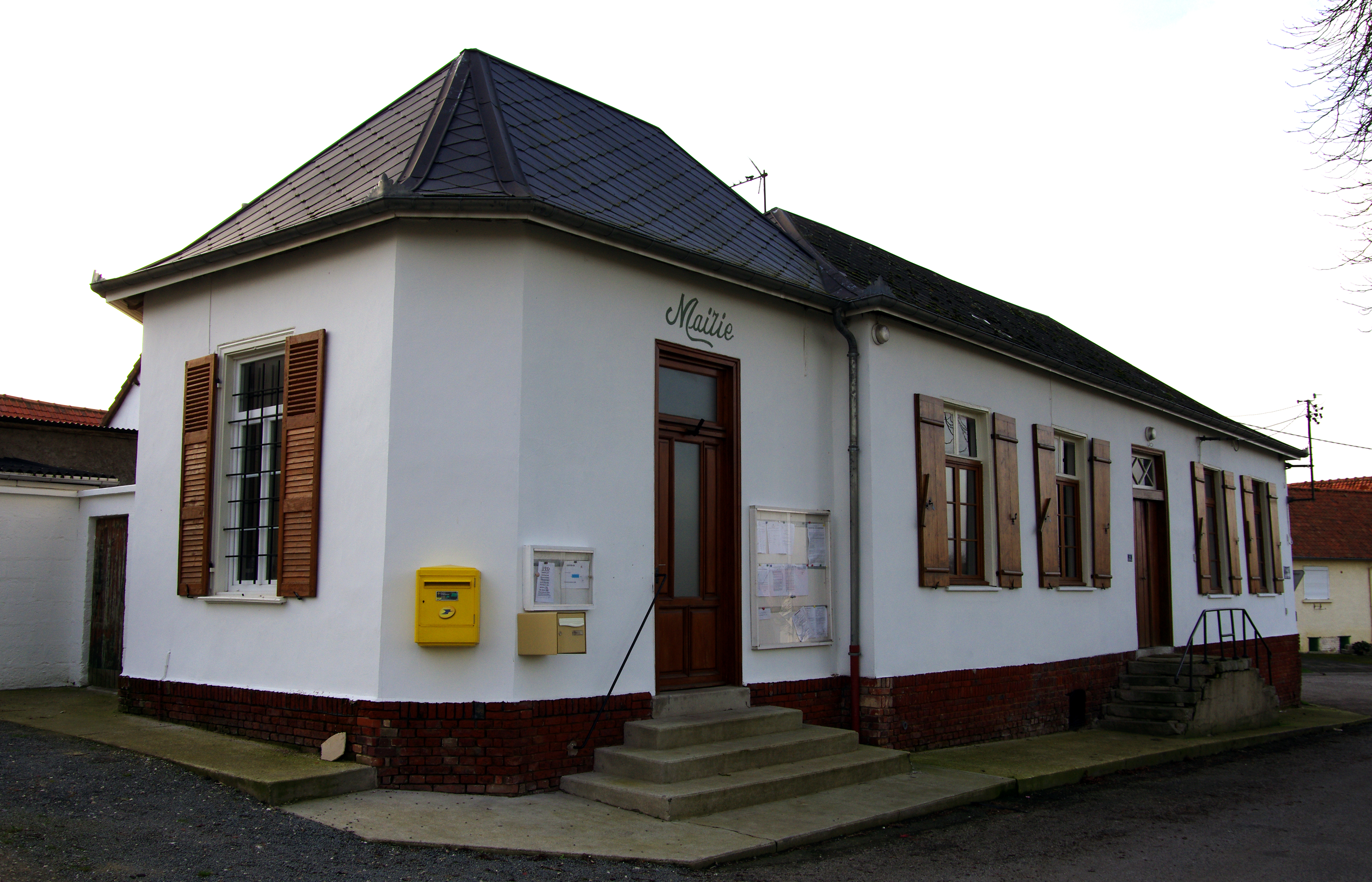 Gorenflos (Somme, France). La mairie.